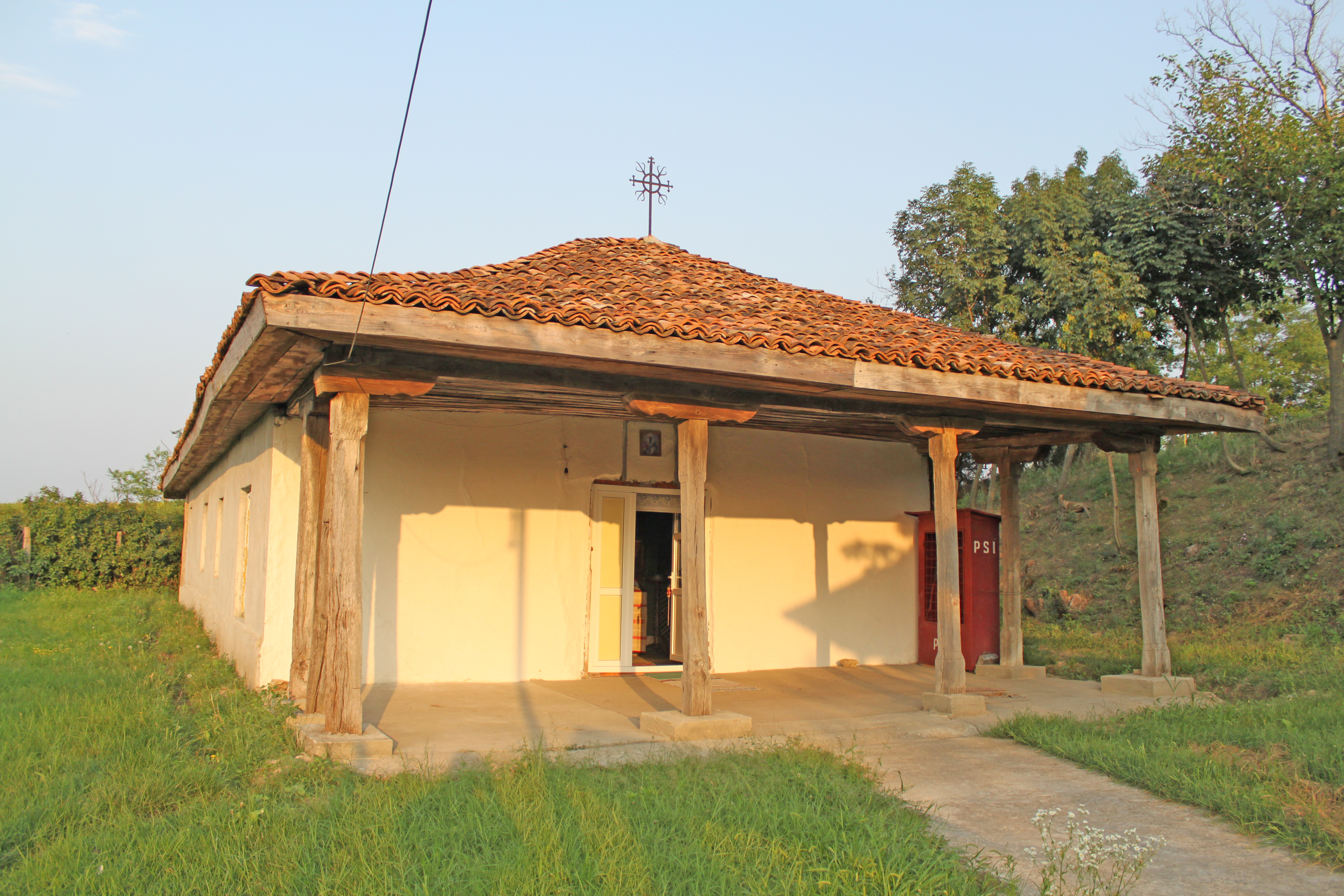 Biserica de lemn din Satu Nou, judeţul Constanţa.